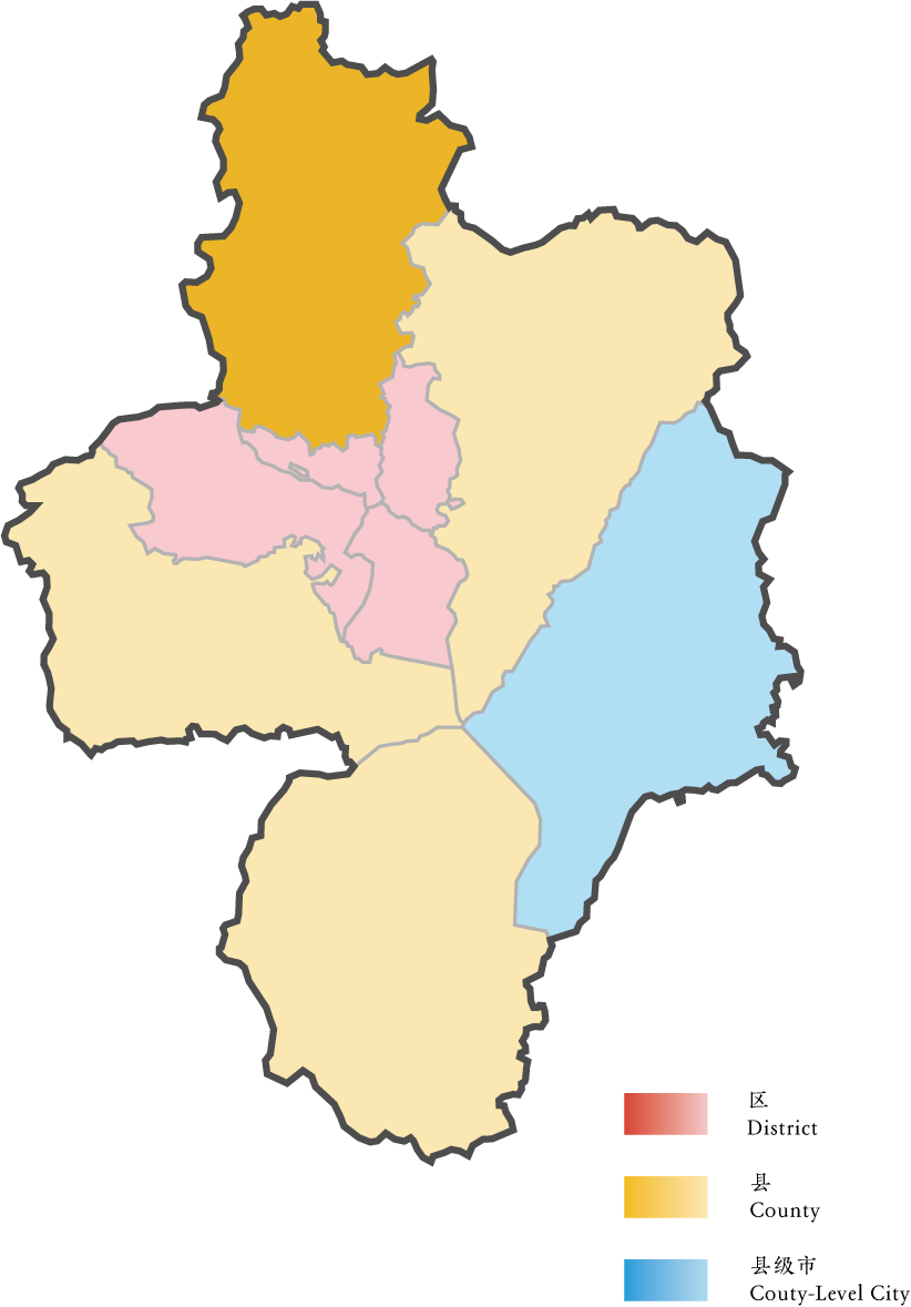 长丰县位置图